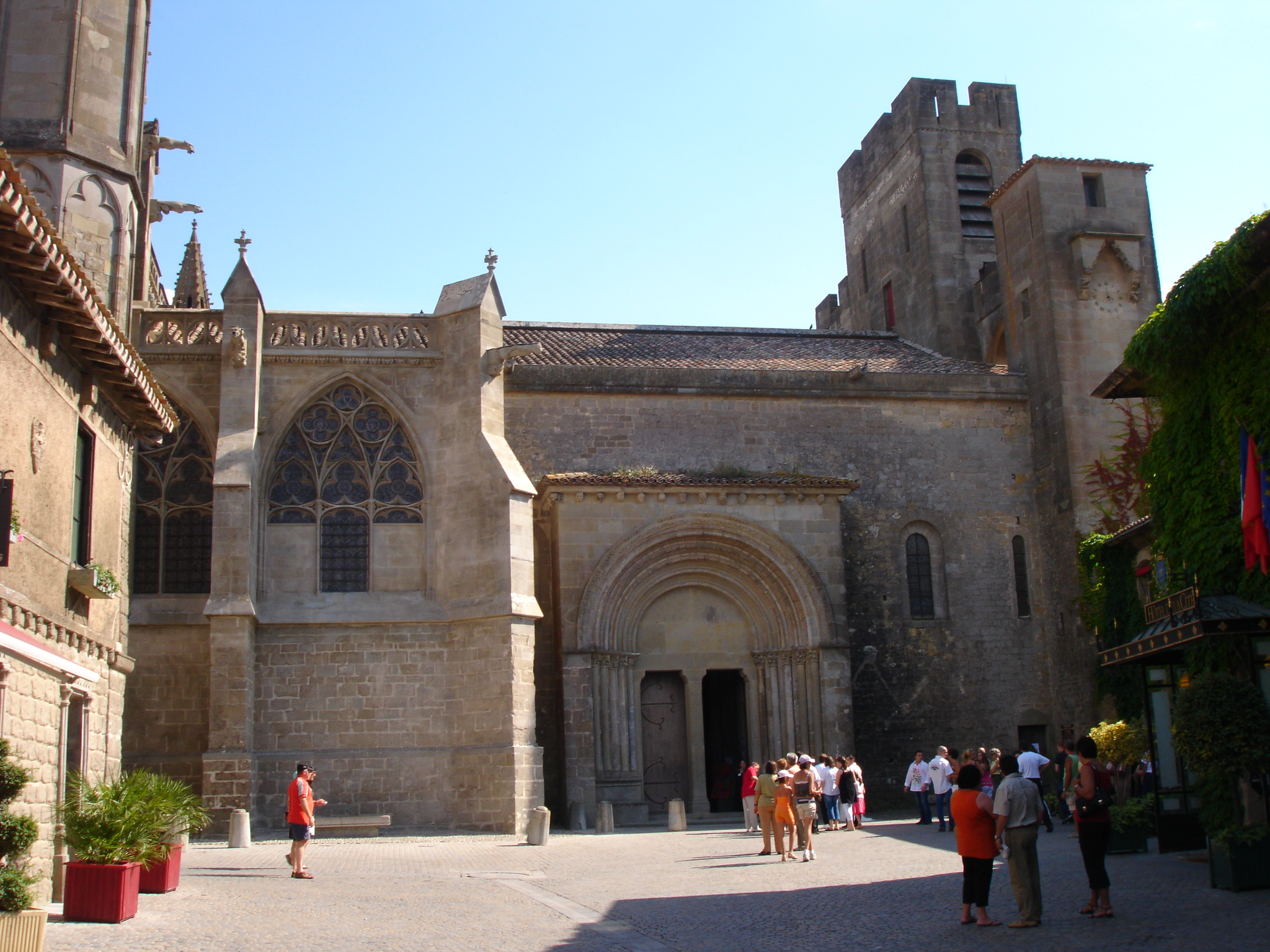 France, Aude (11), Carcassonne, basilique de Saint-Nazaire